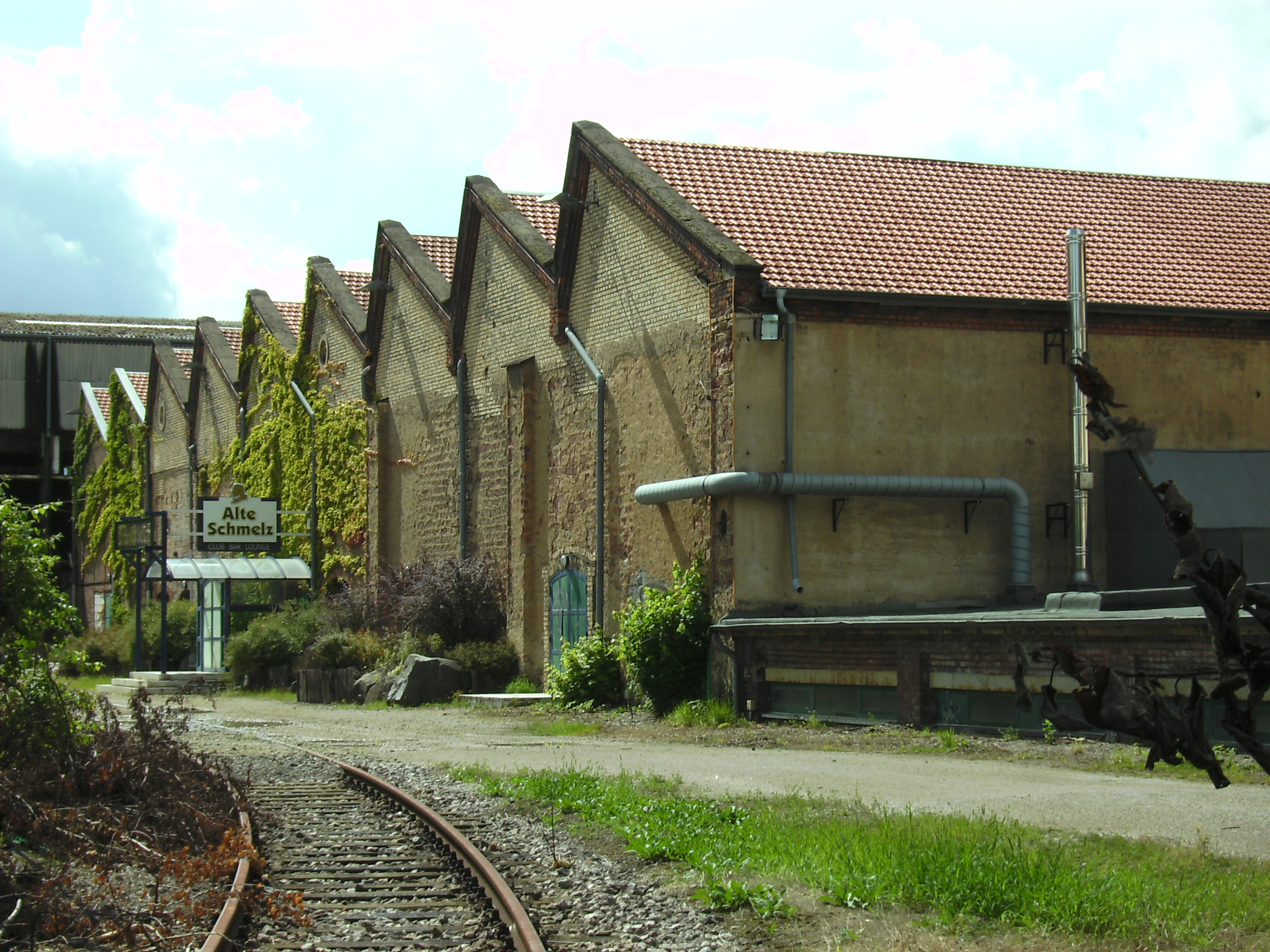 Alte Schmelz St. Ingbert: ehemalige Werkstatt und Lager mit Industriegleis